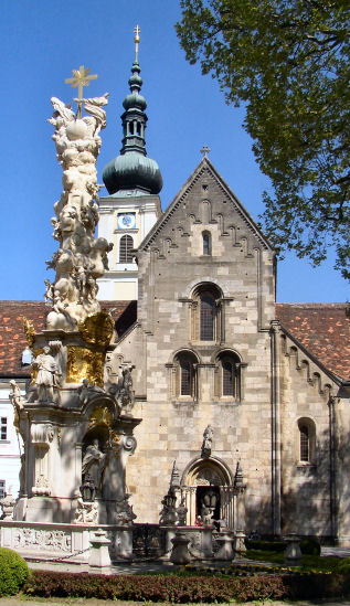 Heiligenkreuz, church of the monastary in Lower Austria - Stift Heiligenkreuz in Niederösterreich; Fassade der Stiftskirche und Dreifaltigkeitssäule